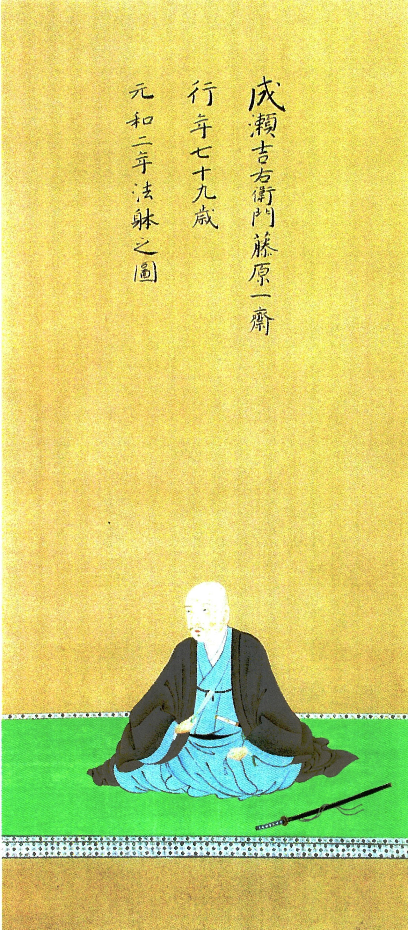 成瀬正一(一斎)の肖像。